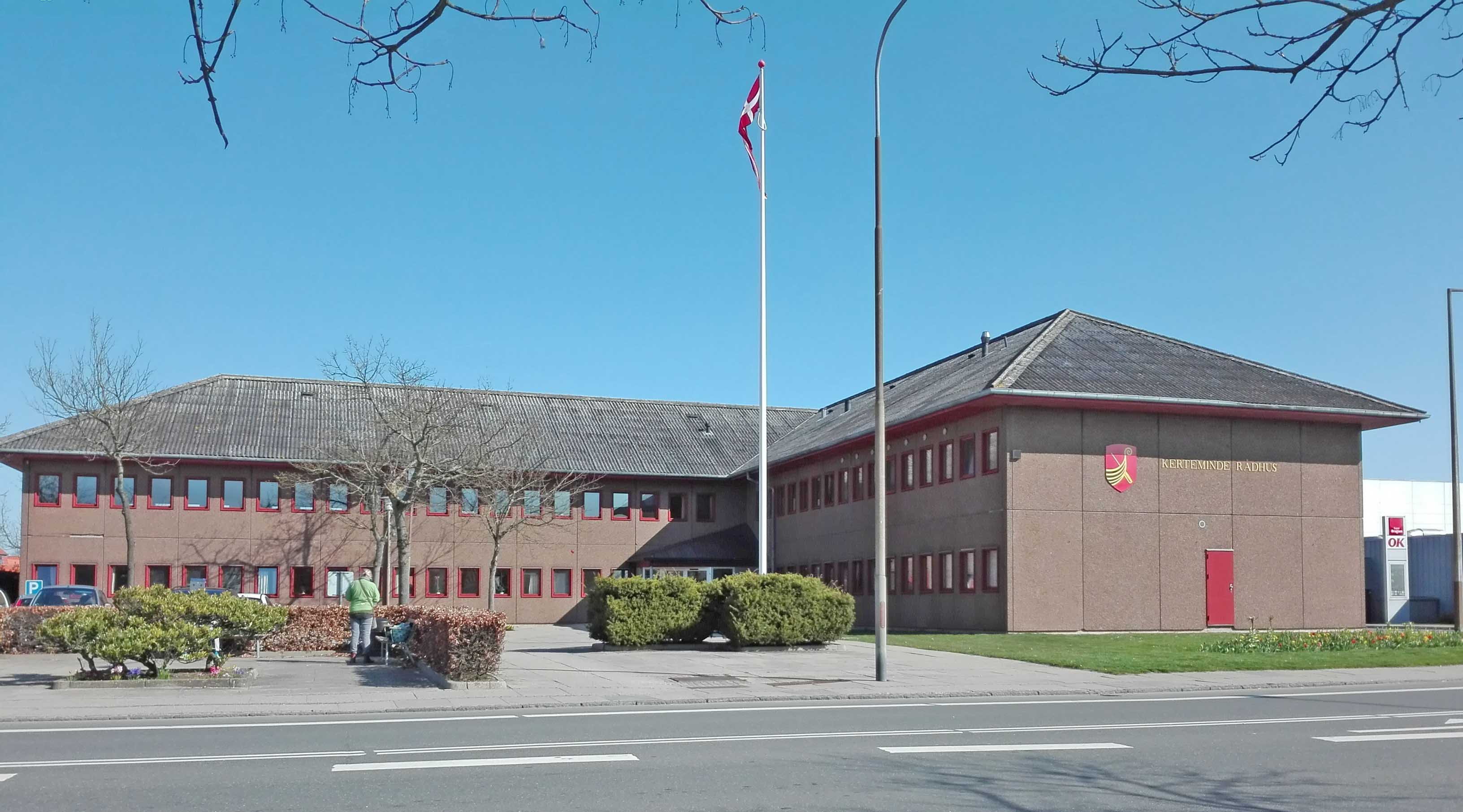 Kerteminde Rådhus fra 1973